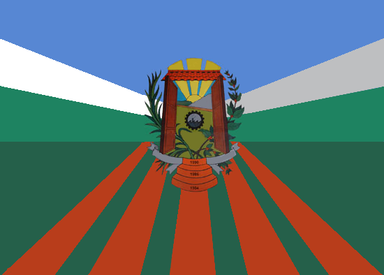 Bandera del municipio Santos Michelena, estado Aragua, Venezuela